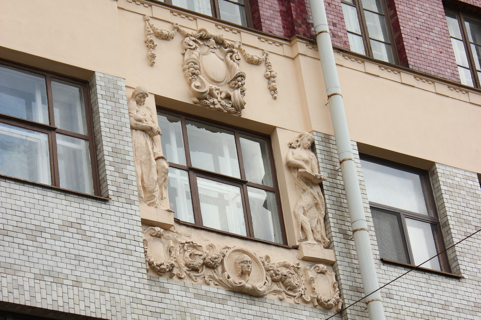 Доходный дом н. п. демидова (Санкт-Петербург и Лен.область, Санкт-Петербург, большой пр., 50)